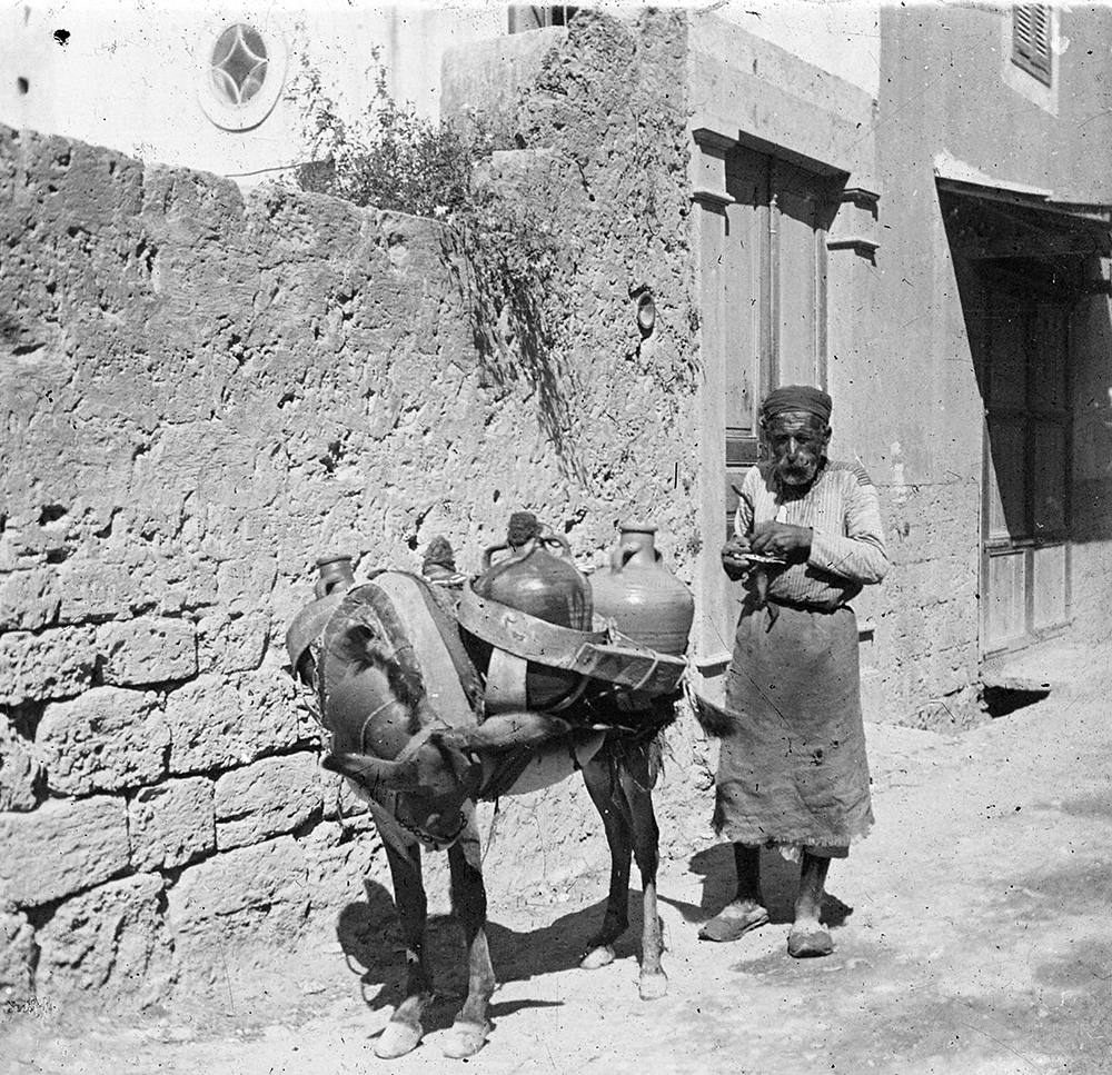 Ane et vieil homme - sans doute en Egypte au XIXème siècle